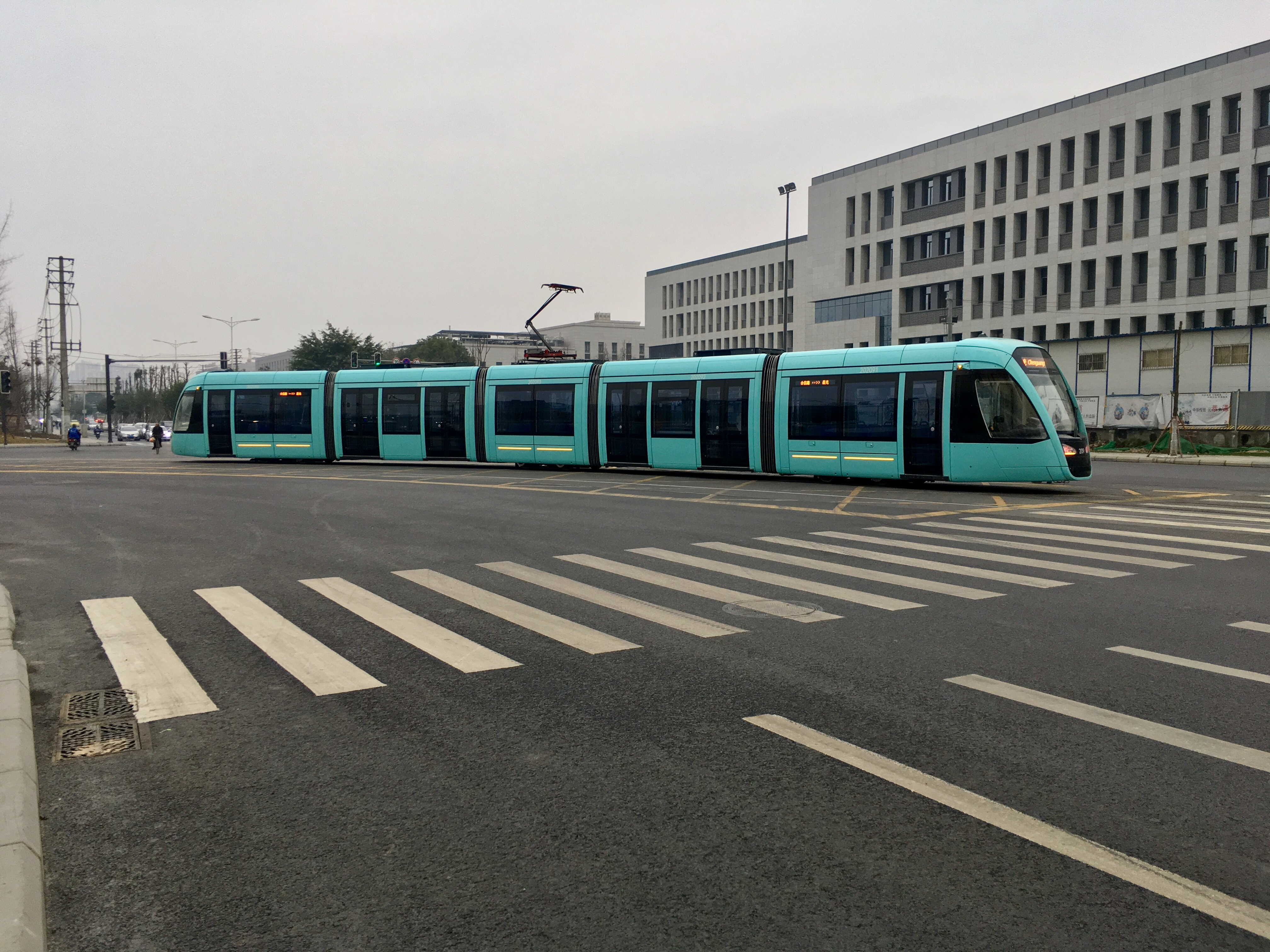 一列在合信路天映路路口转弯的蓉2号线列车